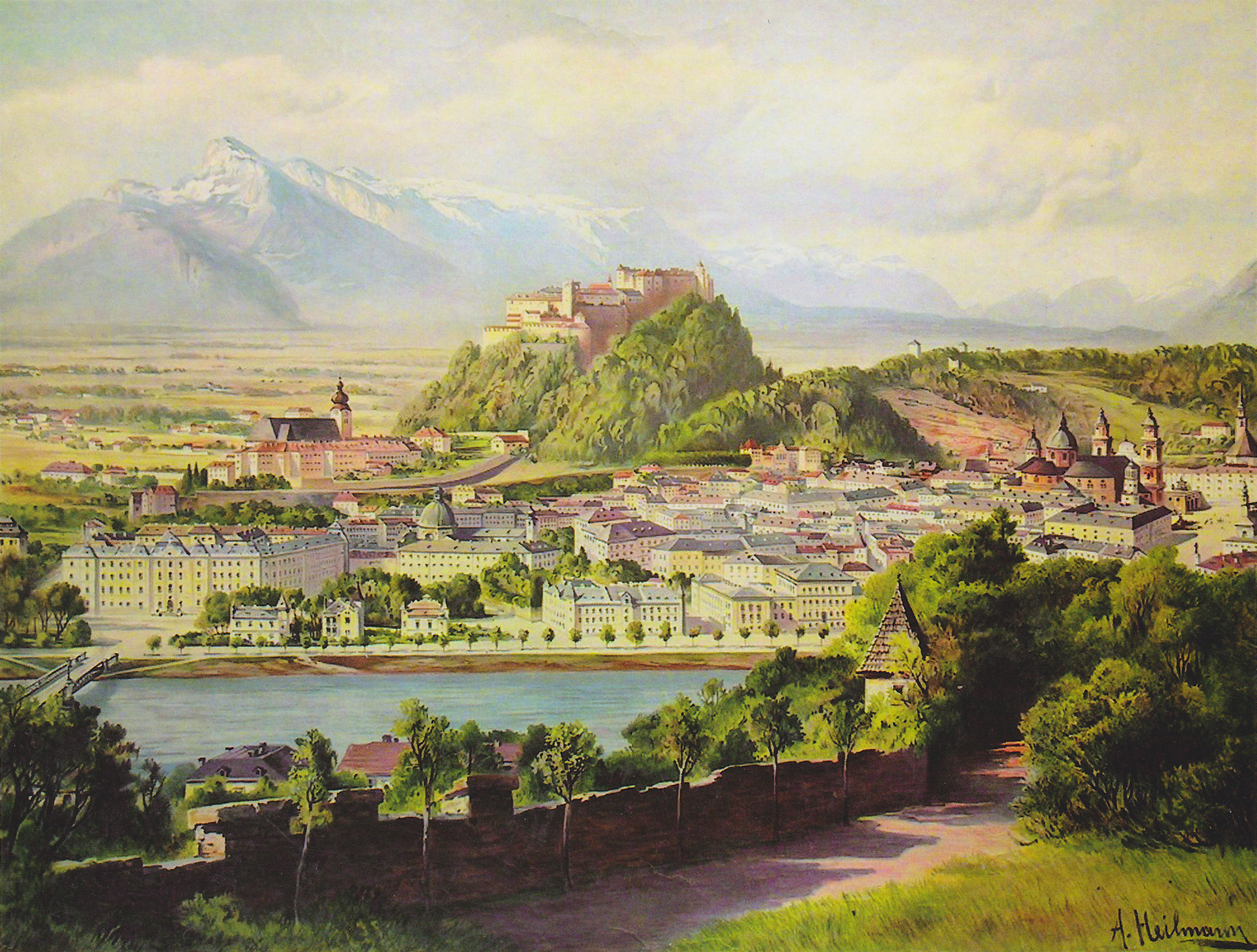 Salzburg – Blick vom Kapuzinerberg auf Altstadt und Festung, Farblithografie von Anton Paul Heilmann